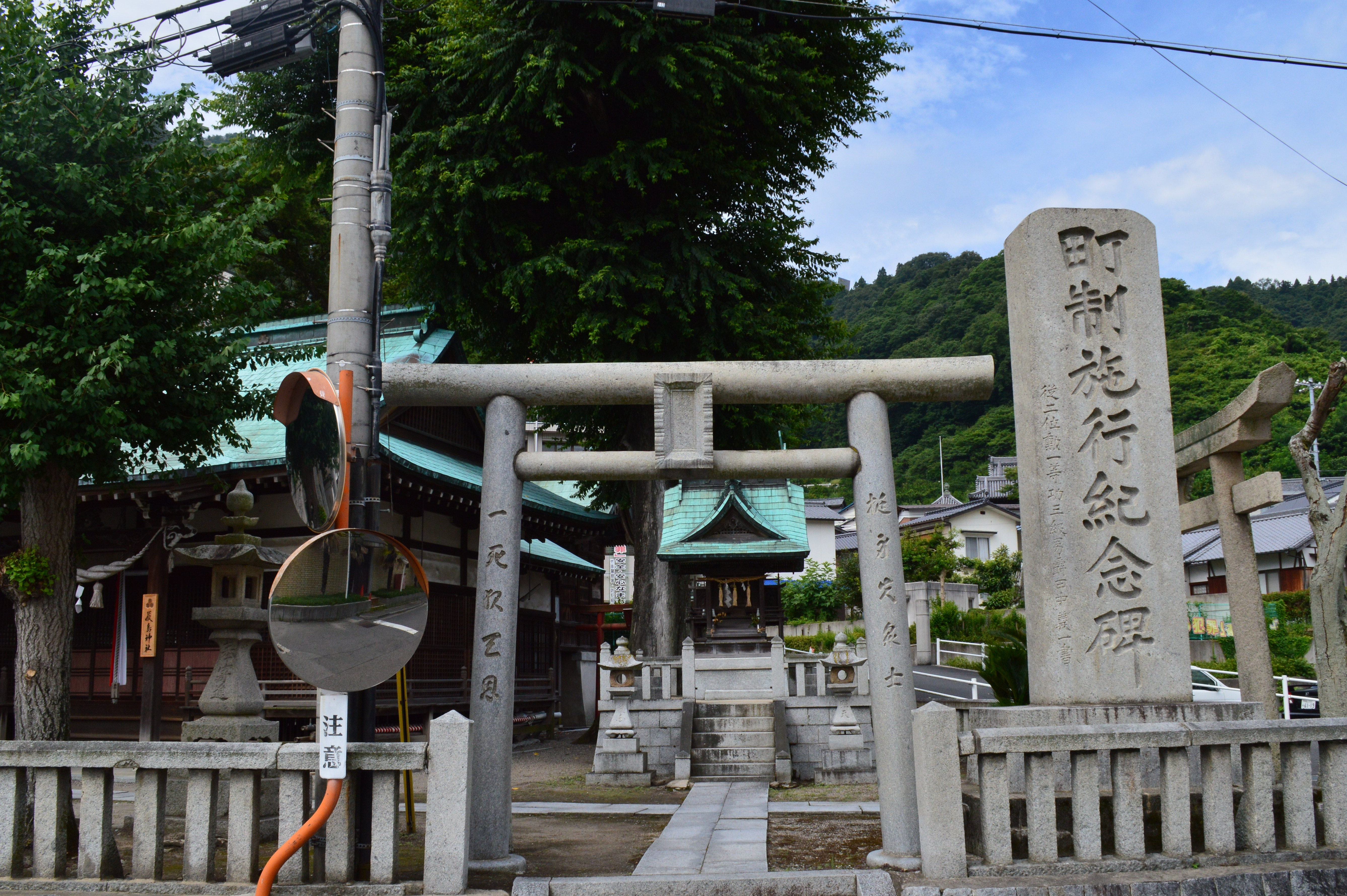 広島県豊田郡大崎上島町の木江地区にある厳島神社